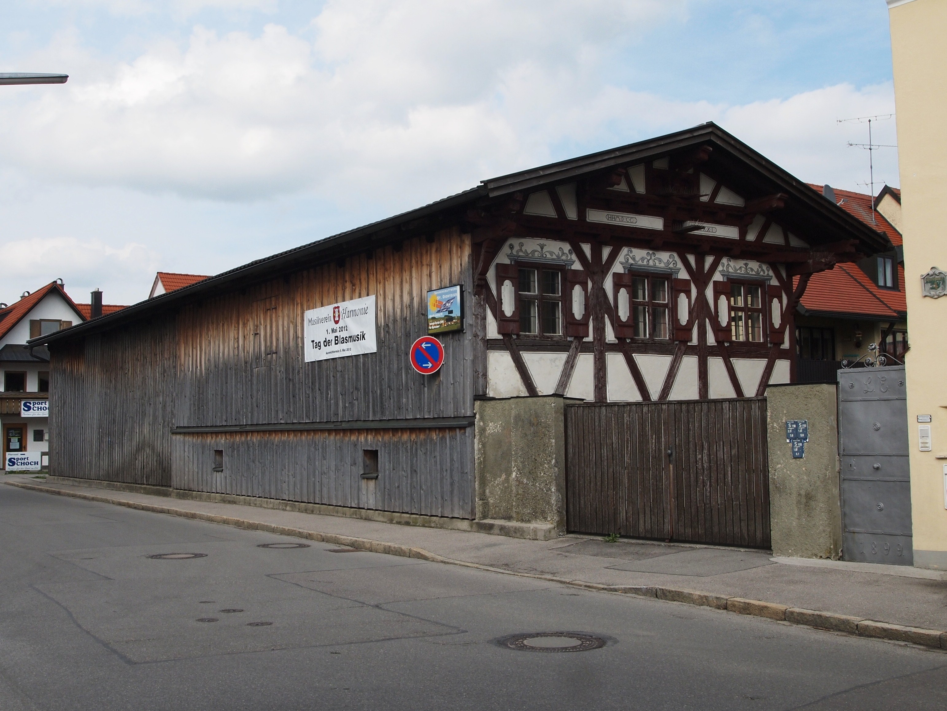 Oberbeuren, Hauptstraße 4, Pfarrstadel